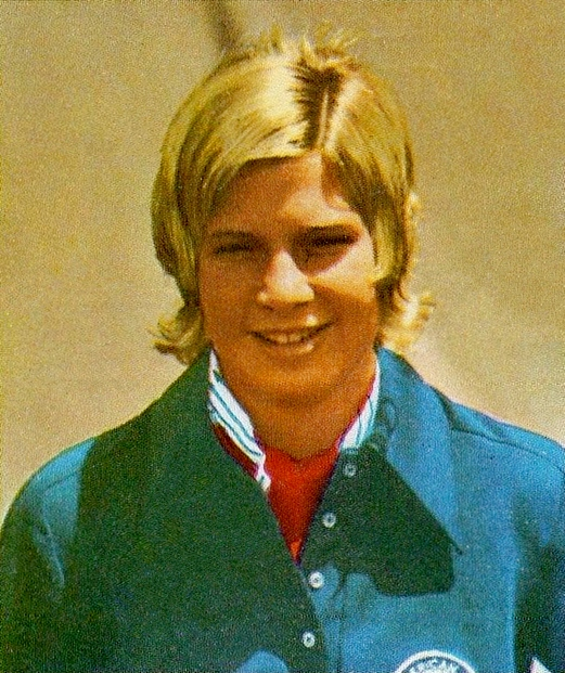 MUNCHEN/MONACO '72-PANINI-Figurina n.202- ATWOOD-USA-NUOTO-Recuperata